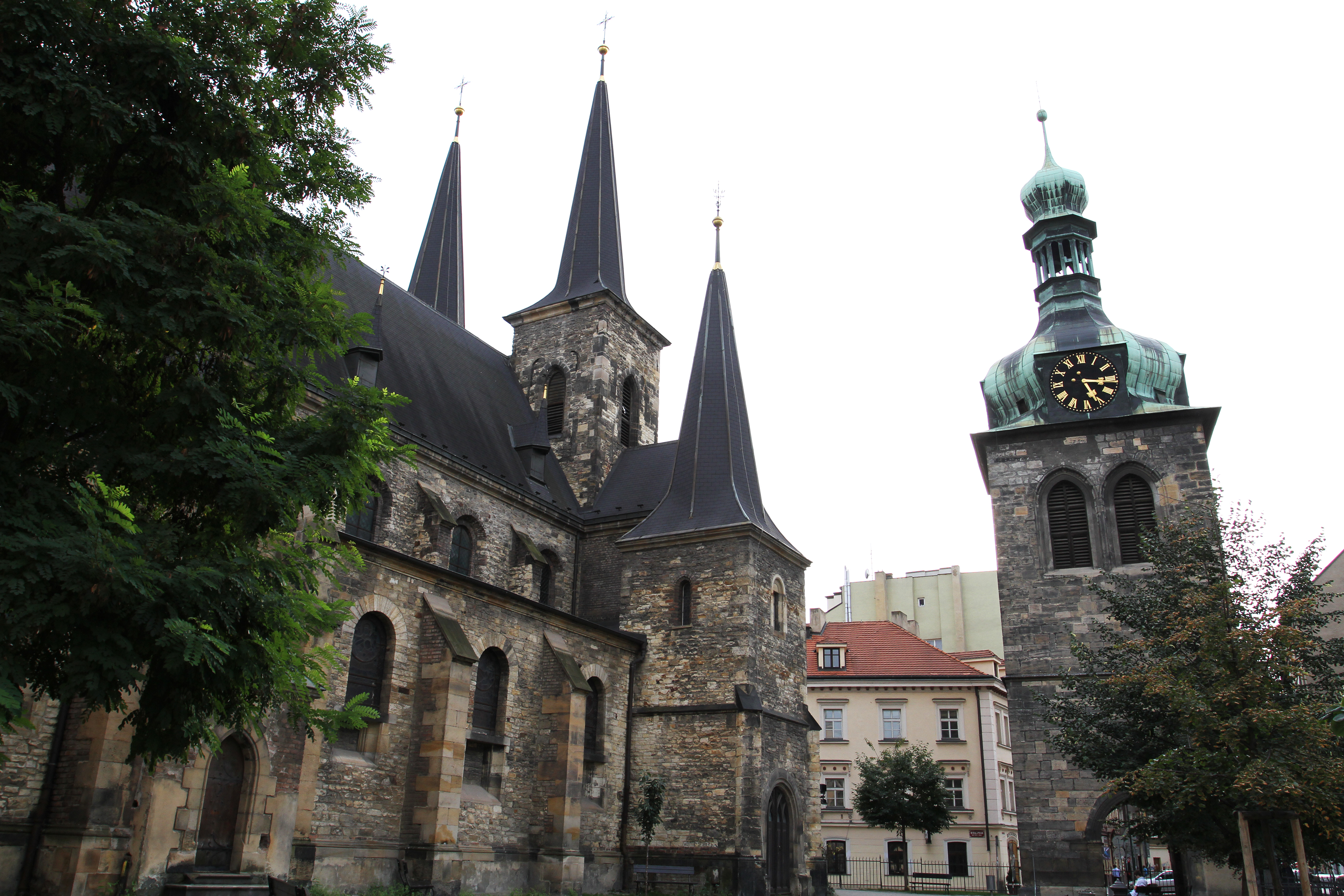 Kostel sv. Petra Na Poříčí (Nové Město), Praha 1, Petrská, zvonice čp. 1232, č. or. 14, Nové Město